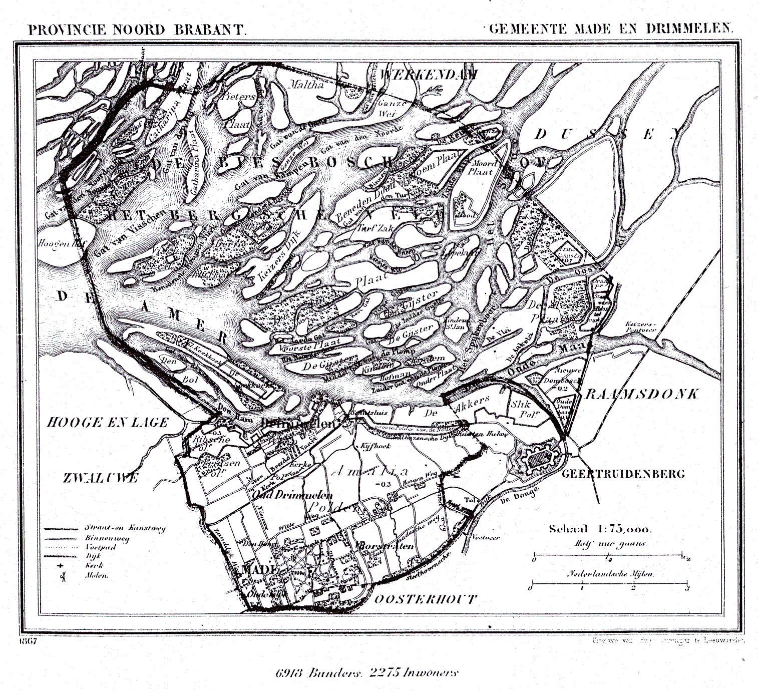 Nederland, Noord-Brabant, Gemeente Made en Drimmelen